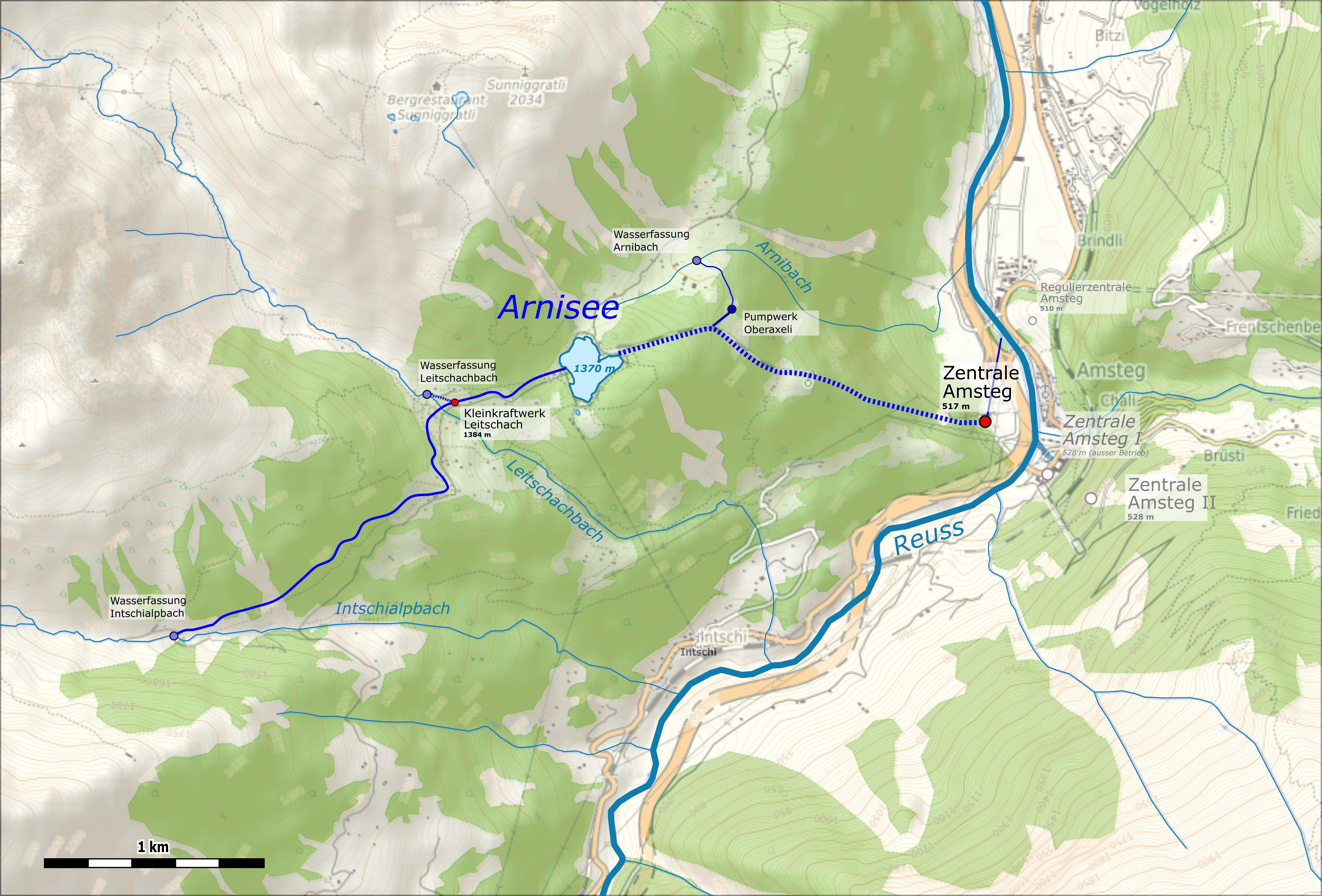 Lagekarte des Kraftwerks Arniberg